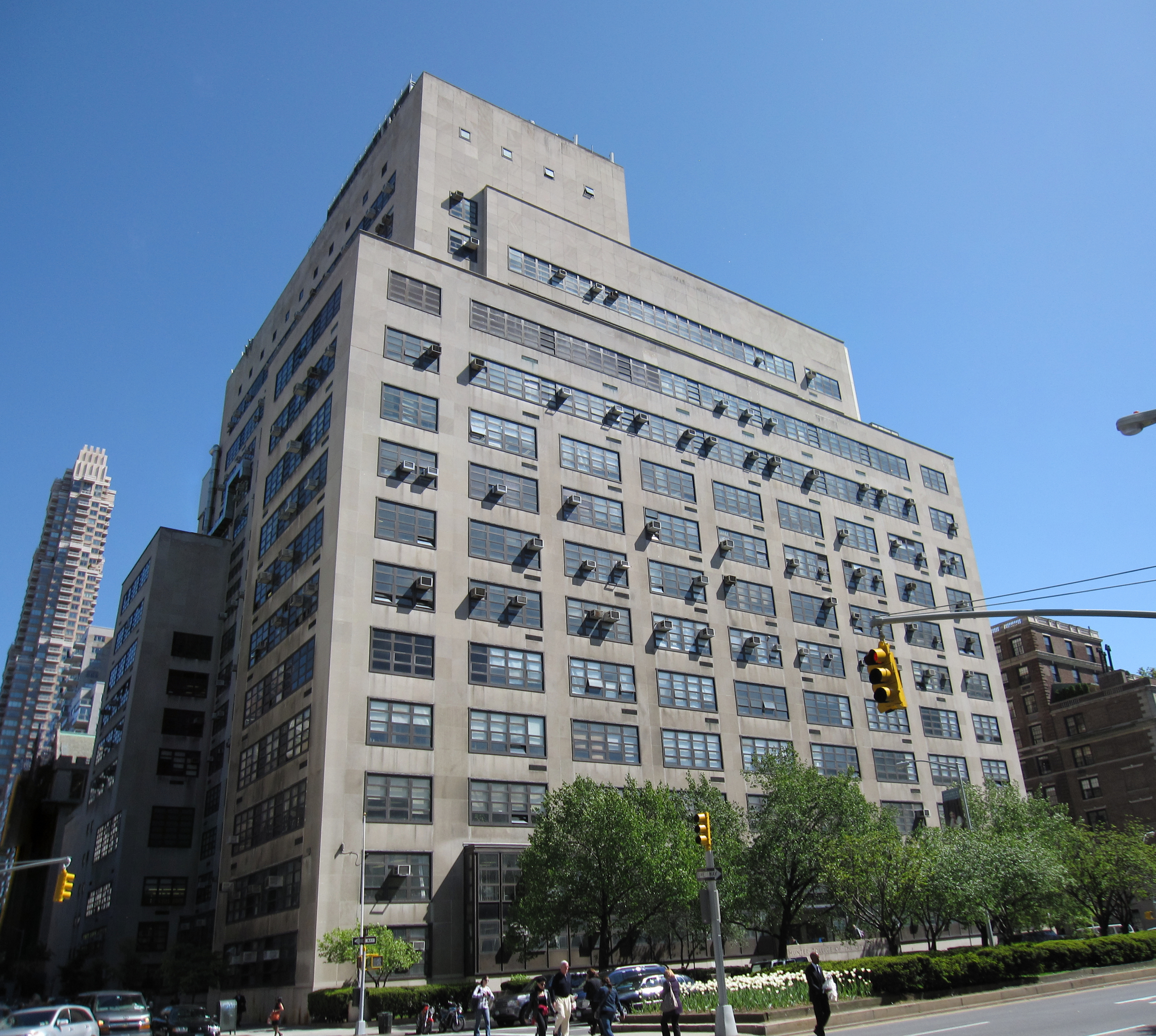 Hunter College